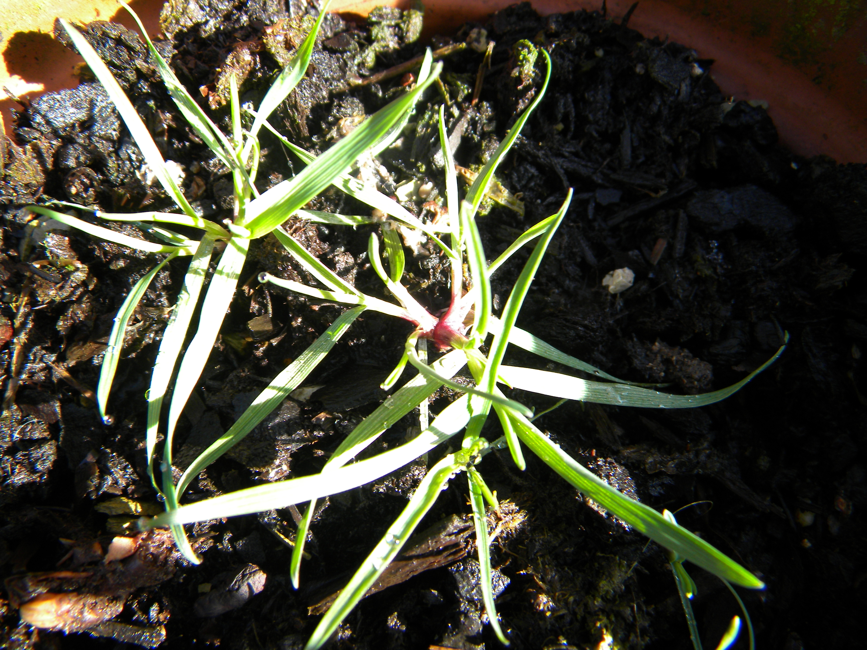 Plantule d'Apera-spica-venti